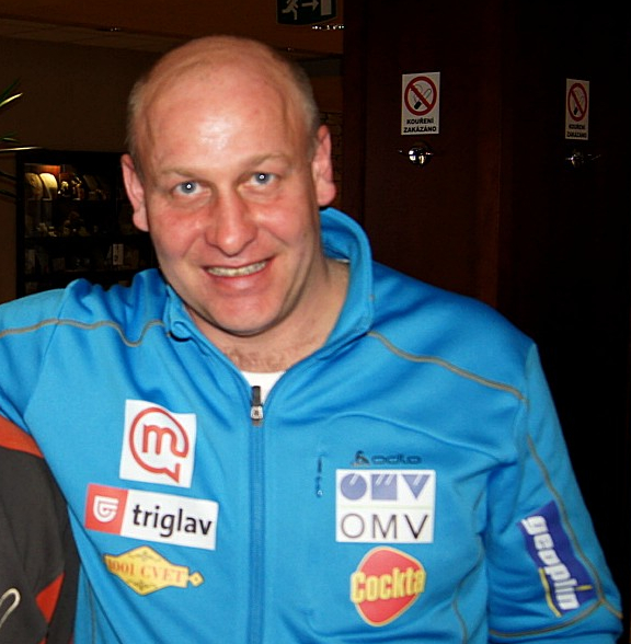 Janus Goran